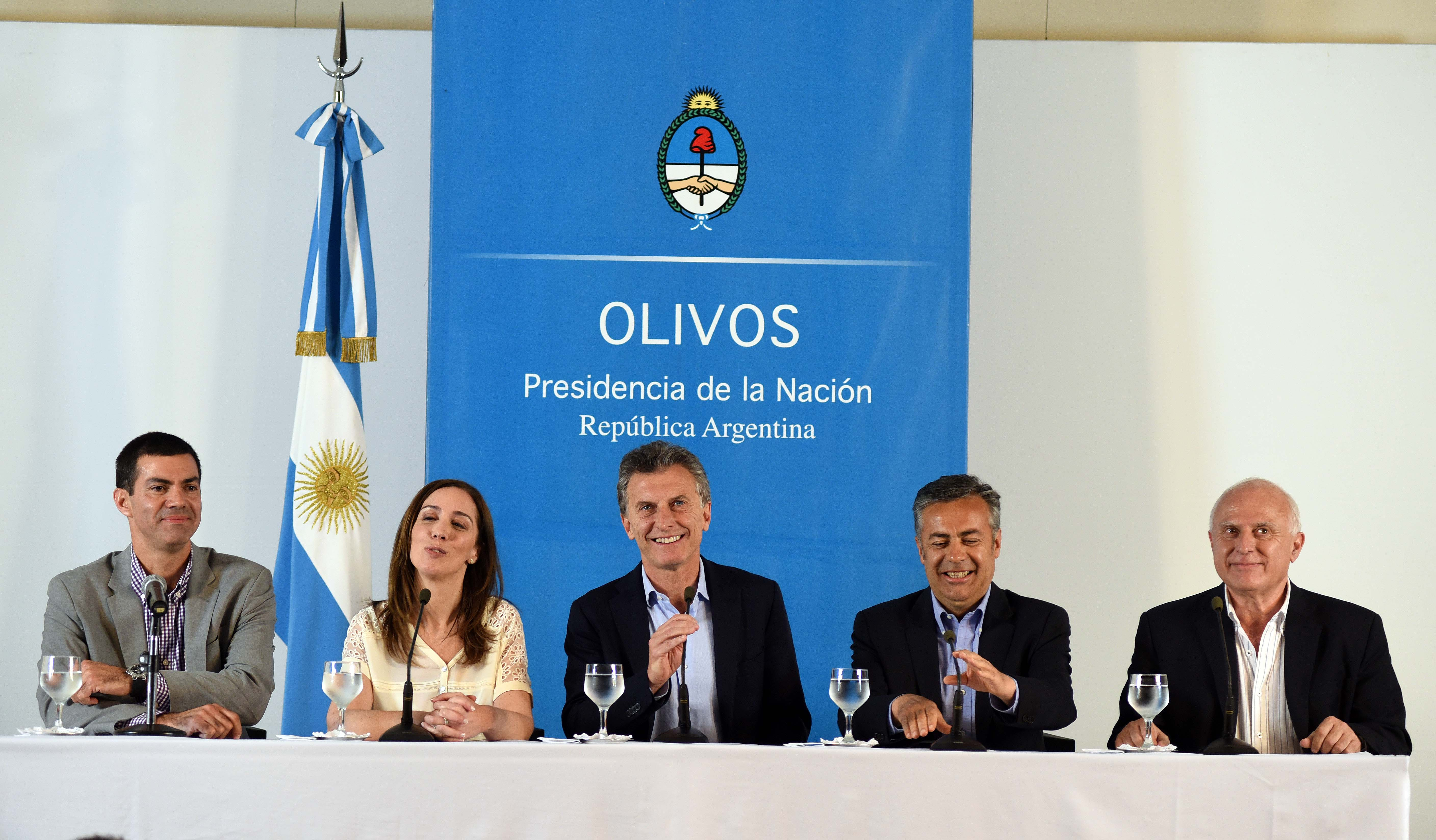 El presidente estuvo acompañado en la conferencia por la gobernadora de la provincia de Buenos Aires, María Eugenia Vidal; el gobernador de Salta, Juan Manuel Urtubey; el gobernador de Mendoza, Alfredo Cornejo; y el gobernador de Santa Fe, Miguel Lifschitz.